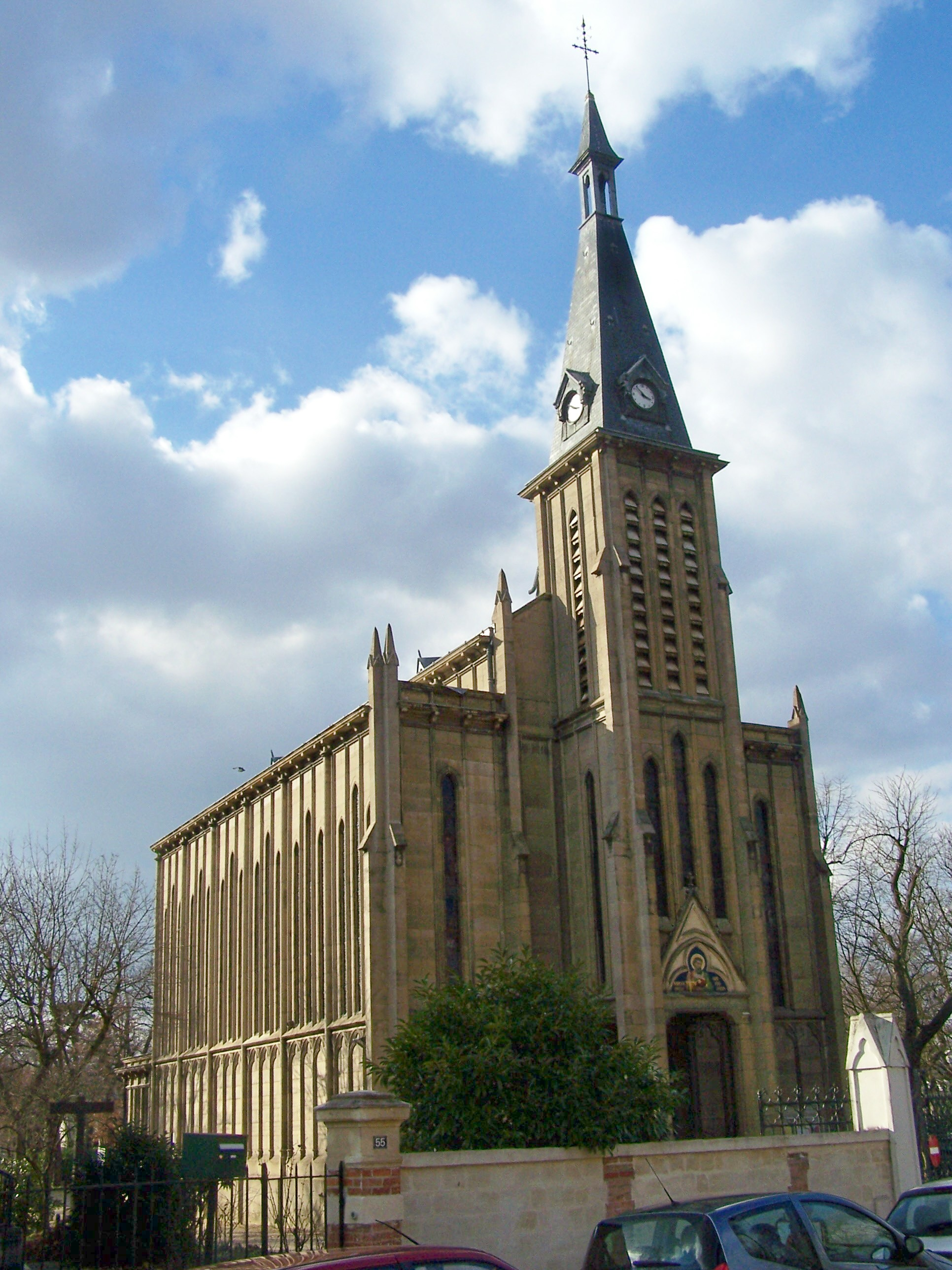 Église St Paul au Vésinet, Yvelines, France